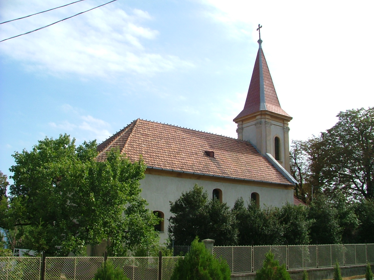 Győrújbarát római katolikus temploma